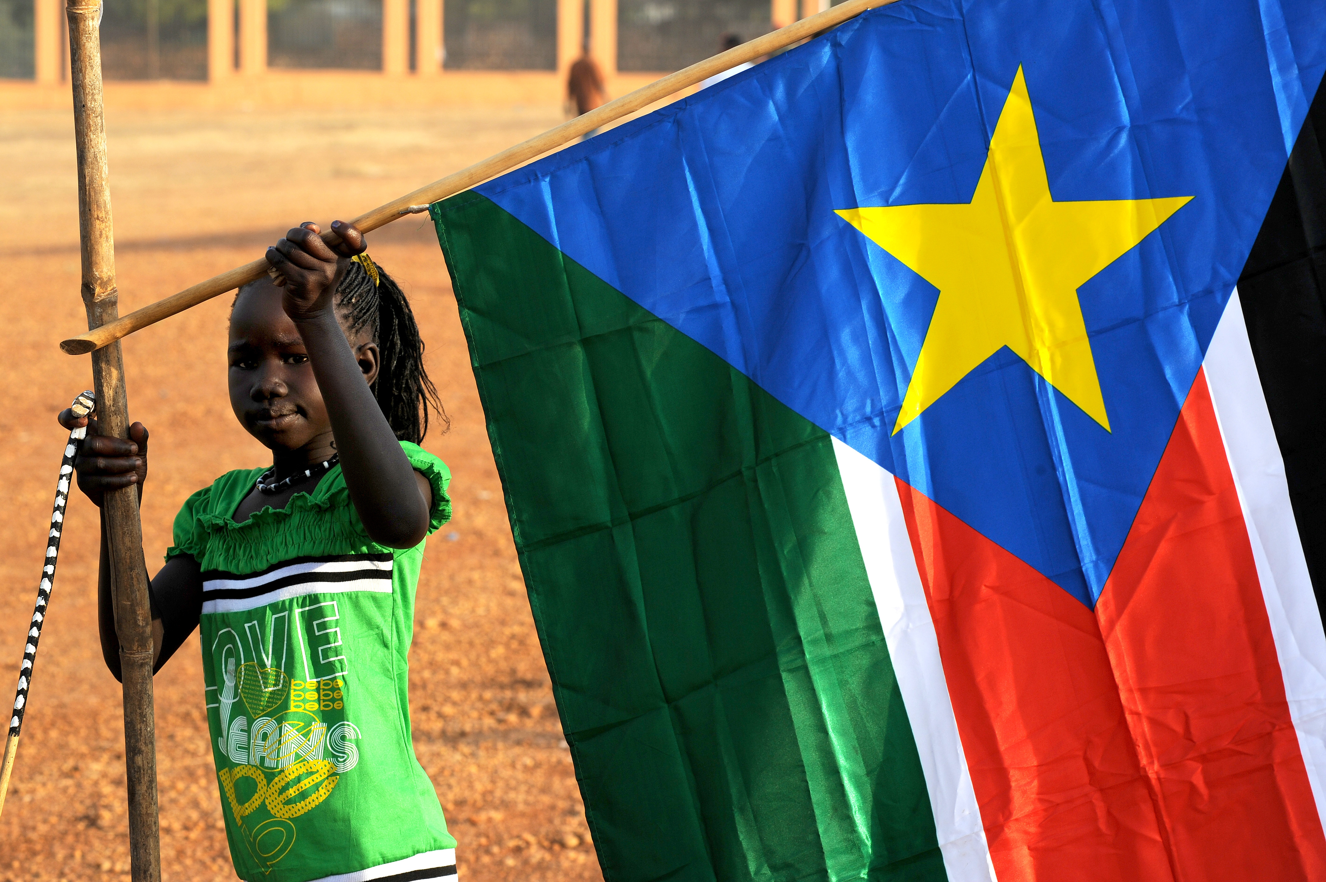 (Timothy McKulka/USAID)